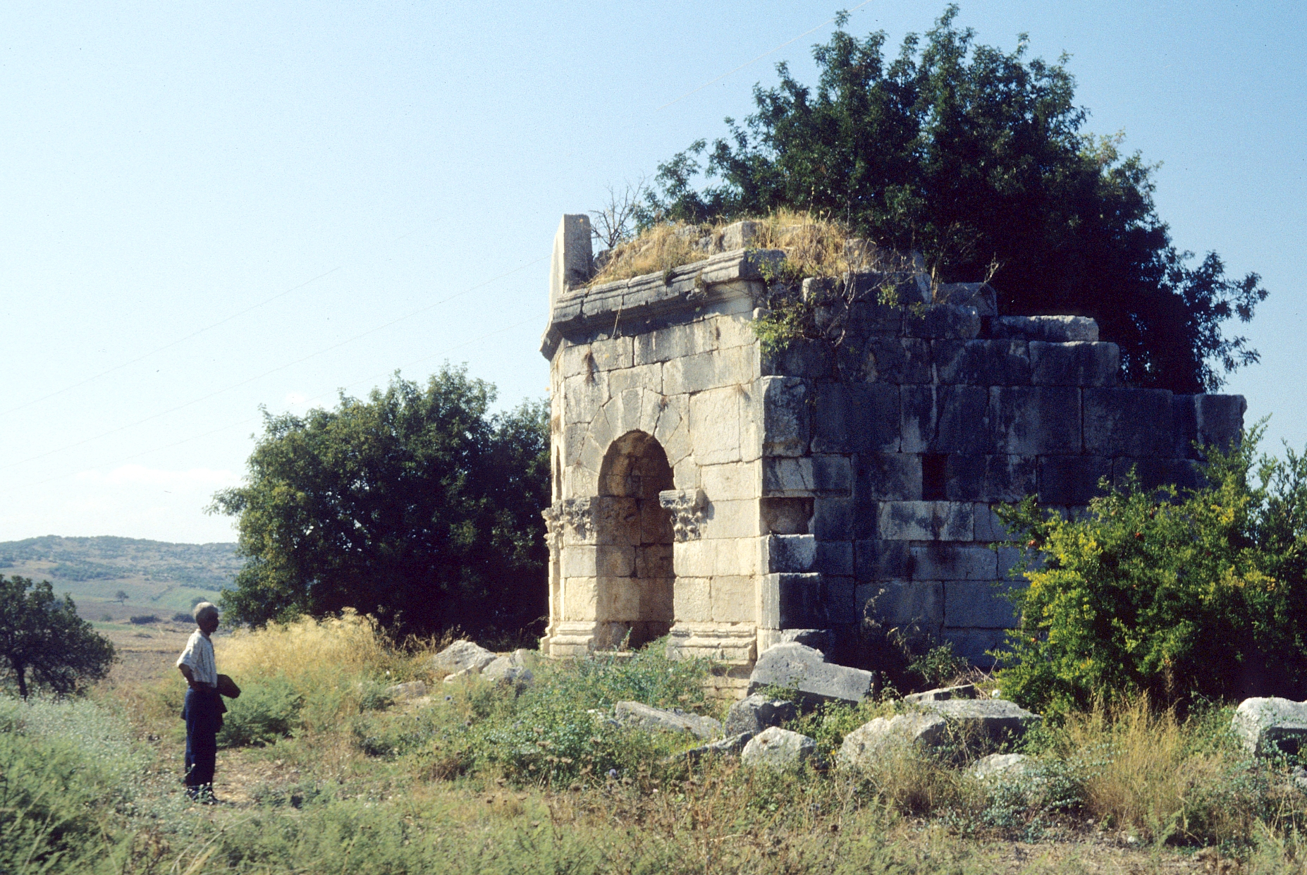 Antike Stadt Hierapolis Castabala bei Osmaniye, Südtürkei, Reste einer Kirche